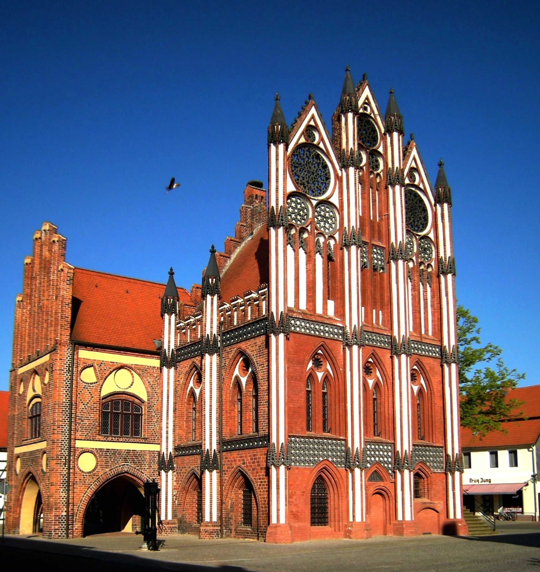 Tangermünde - Rathaus